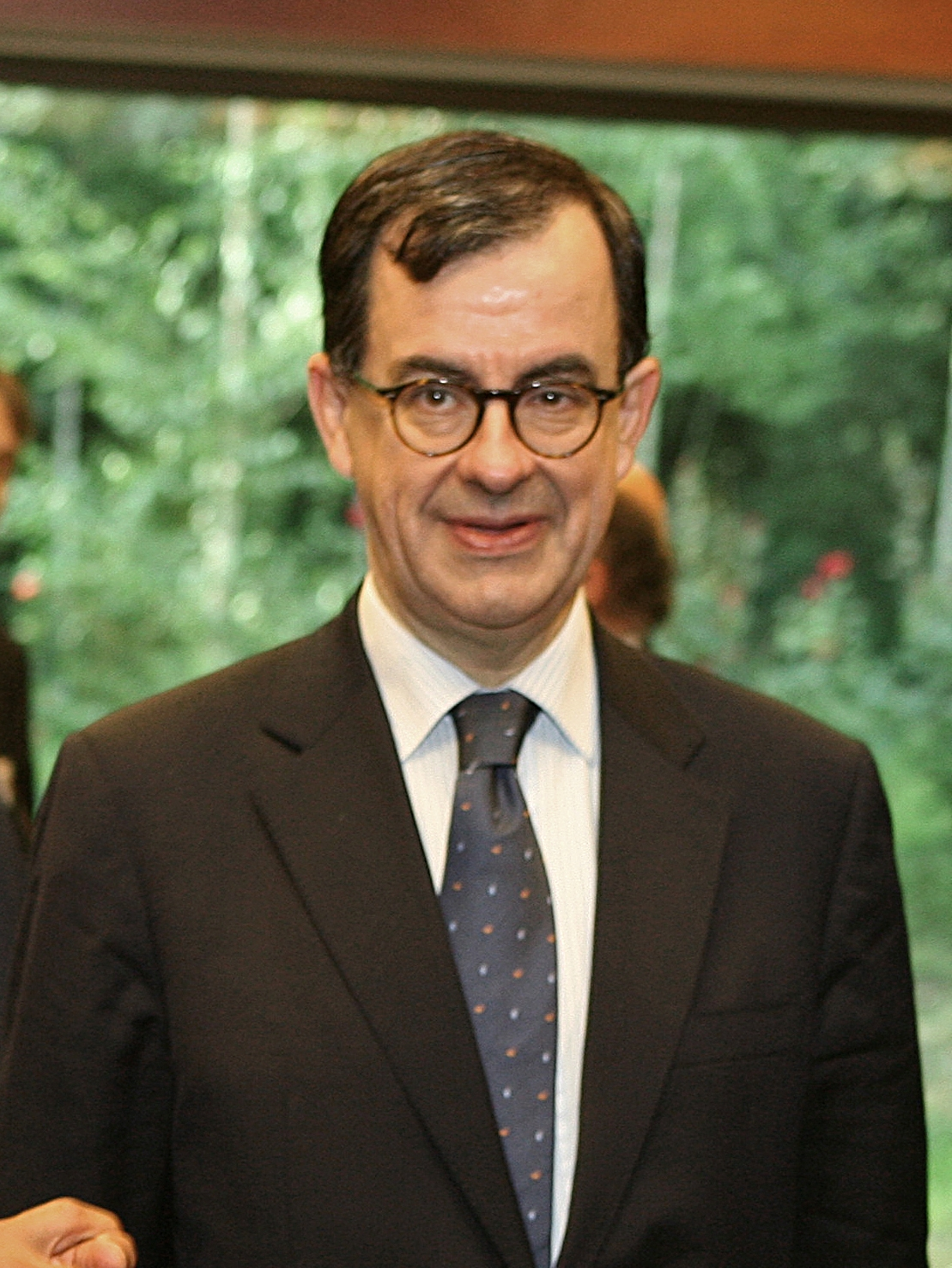 Presidente do Tribunal de Contas de Portugal